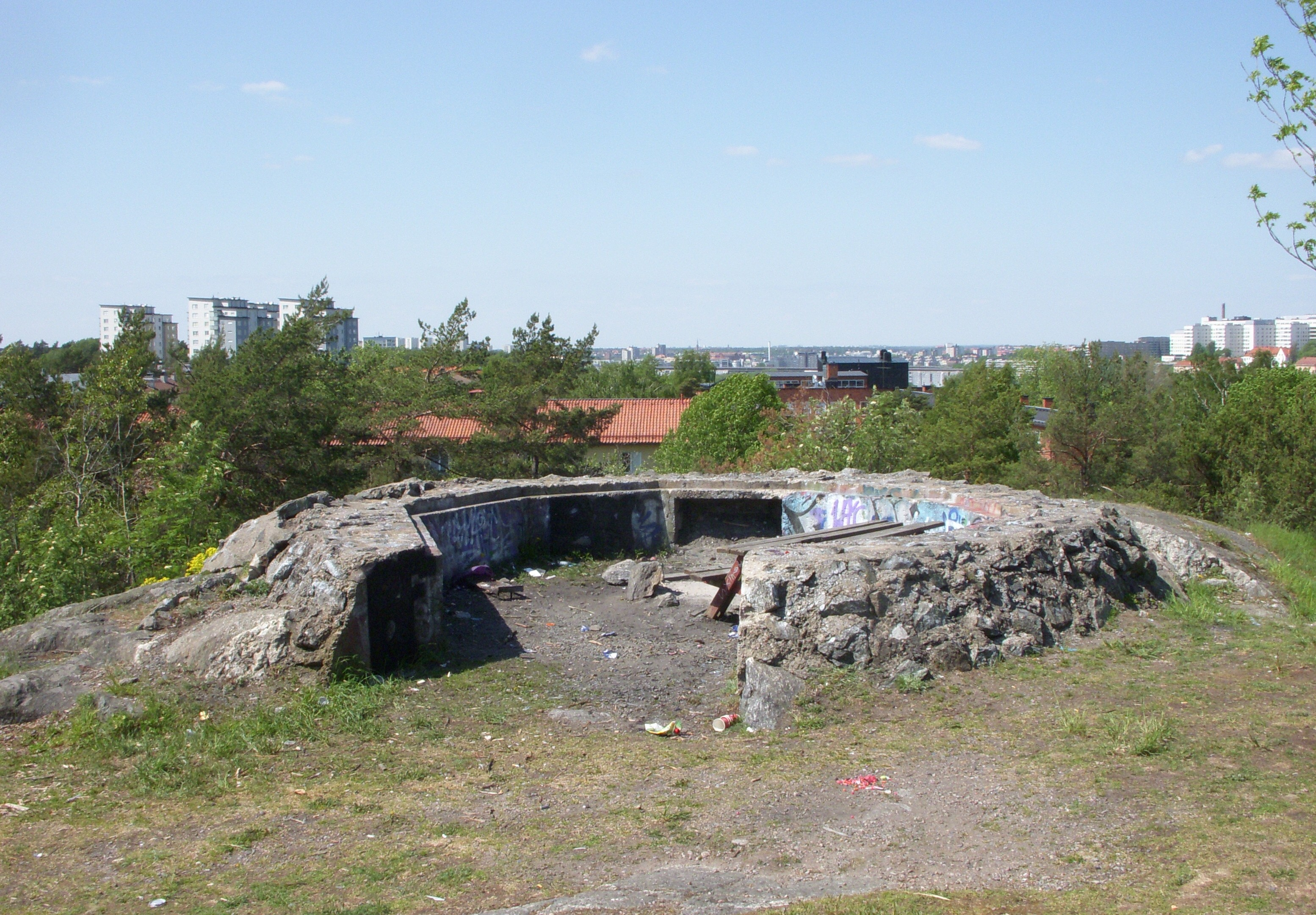 Skanskvarns luftvärnsställning i stadsdelen Johanneshov